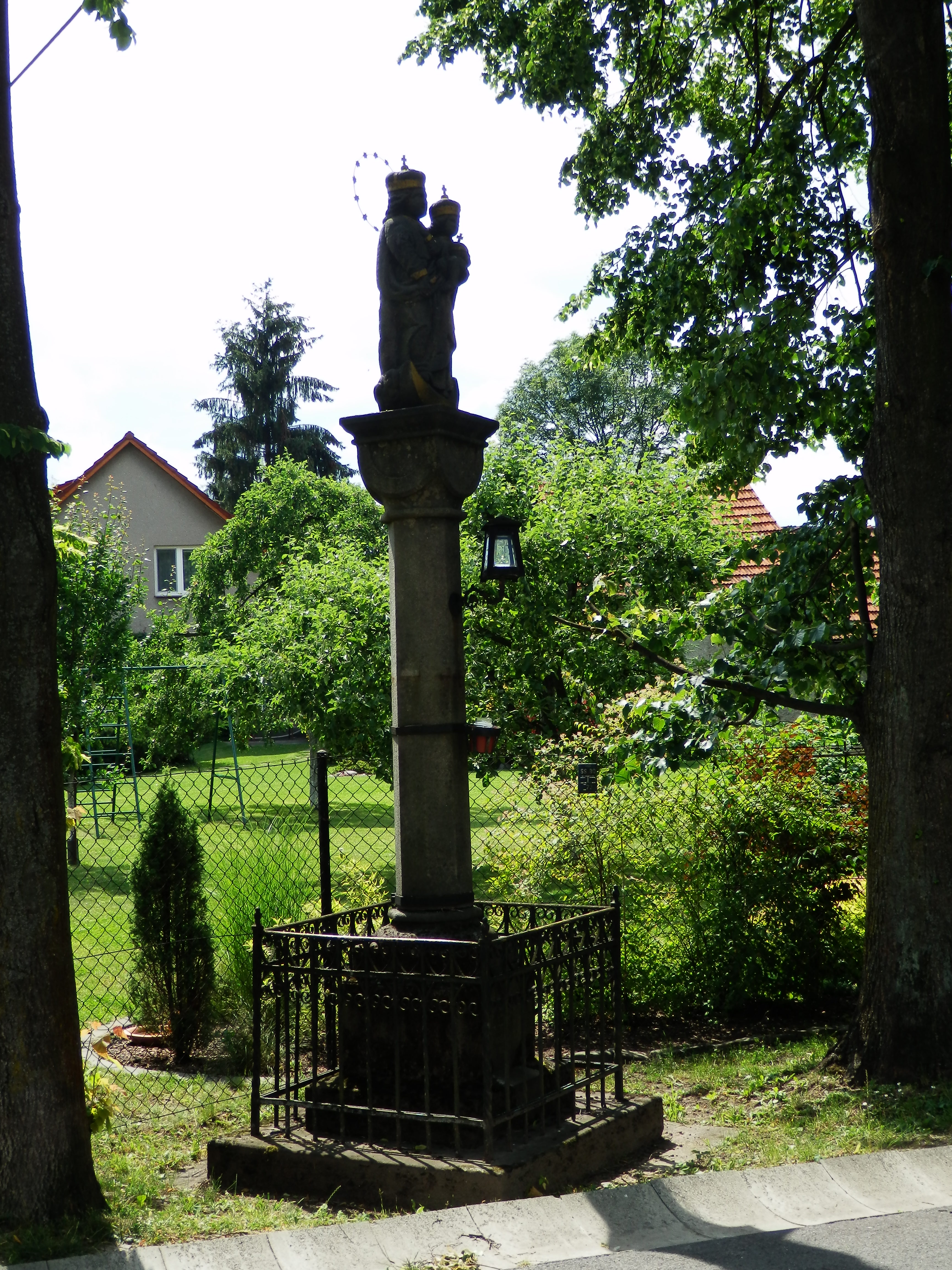 Sloup se sochou Panny Marie s Ježíškem, proti čp. 258, Větřkovice (Kopřivnice).